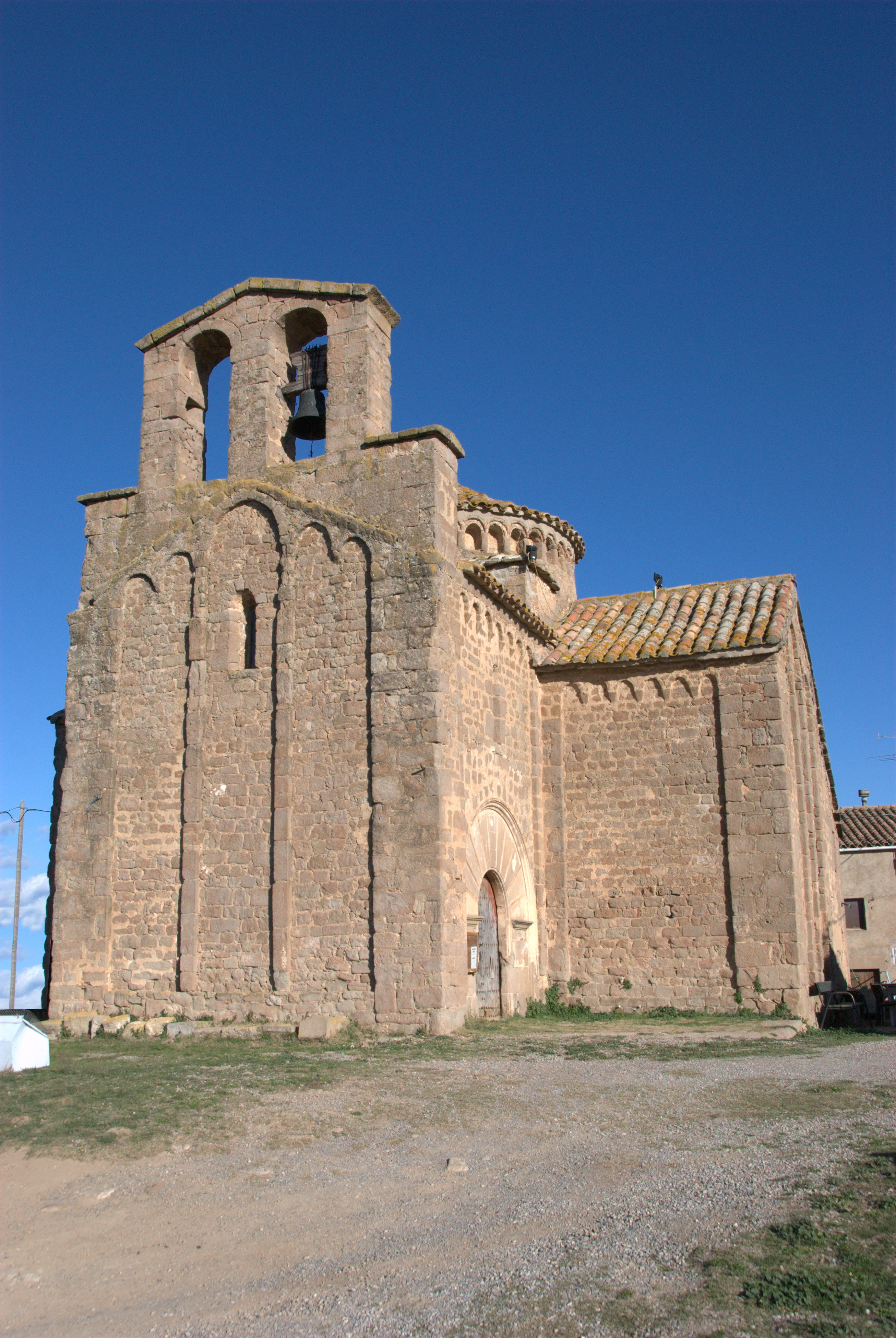 Vista de l'església romànica de Sant Cugat del Racó